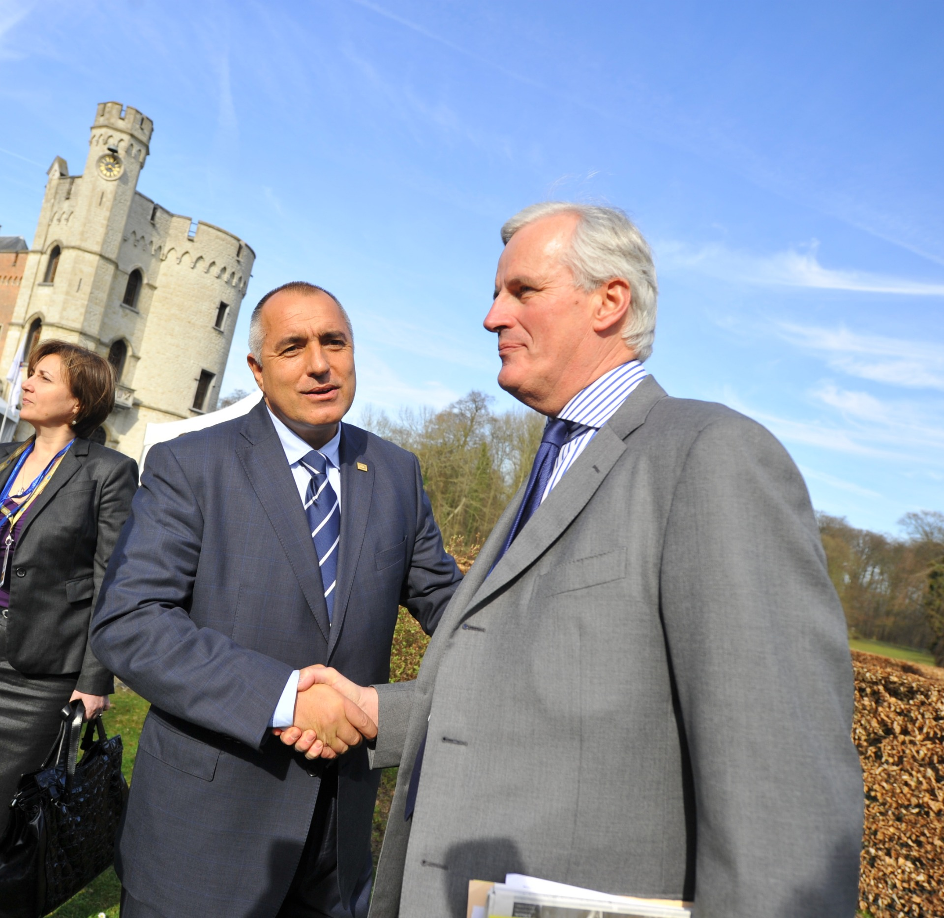 Barnier, Borisov